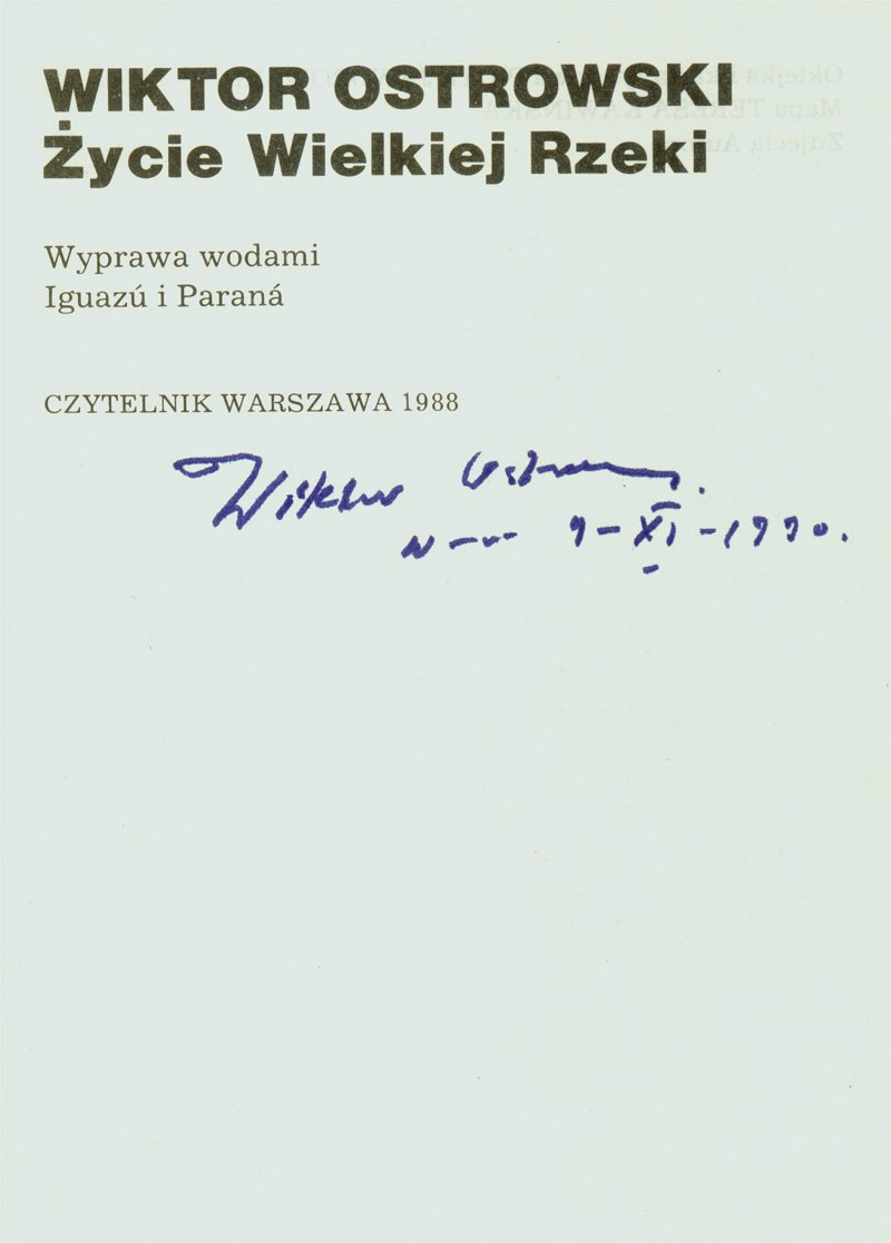 Wiktor Ostrowski(1905-1992) - Autograph